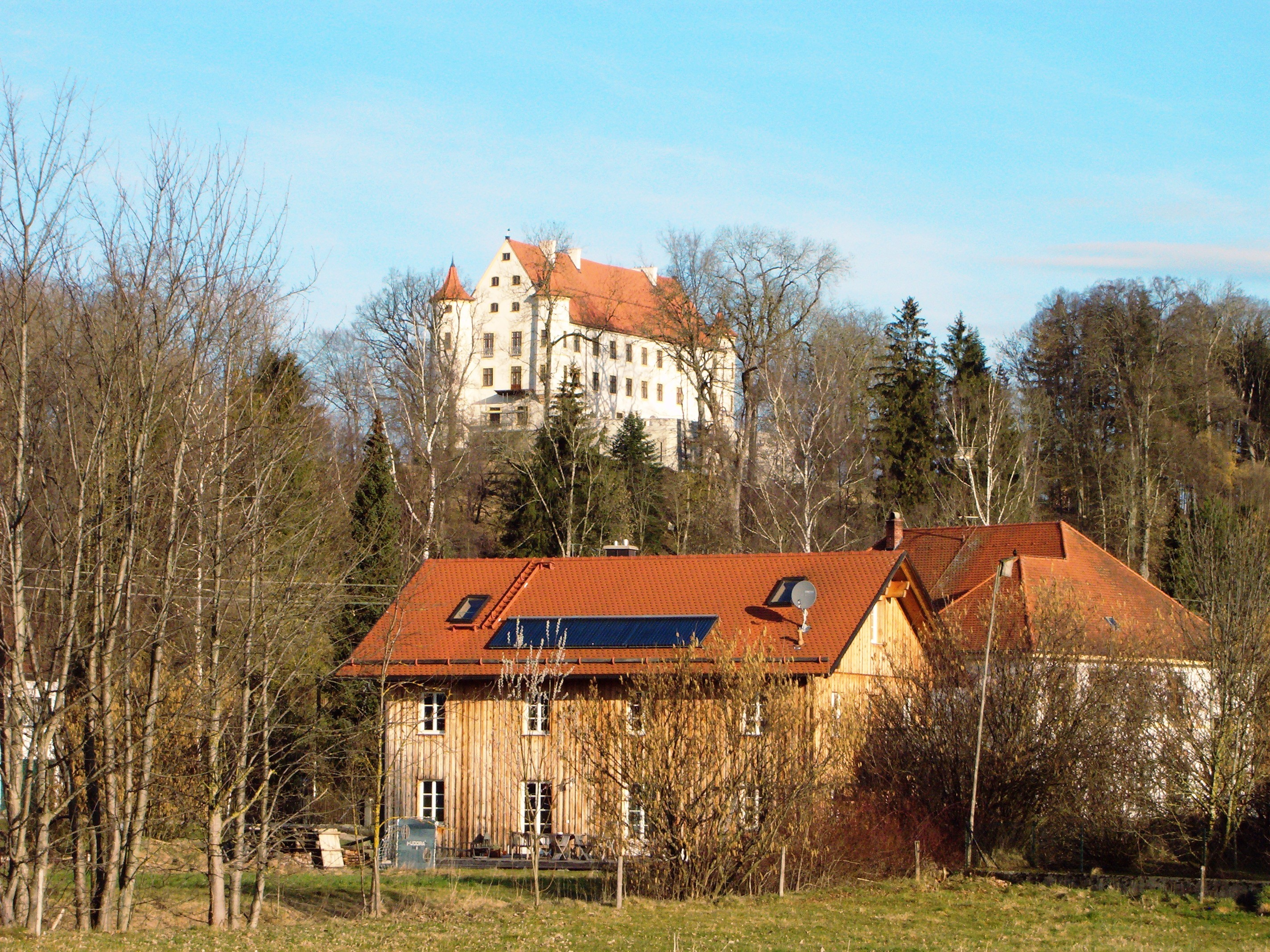 Schloß Freyberg, Gemeinde Unterdießen, Kreis Landsberg am Lech